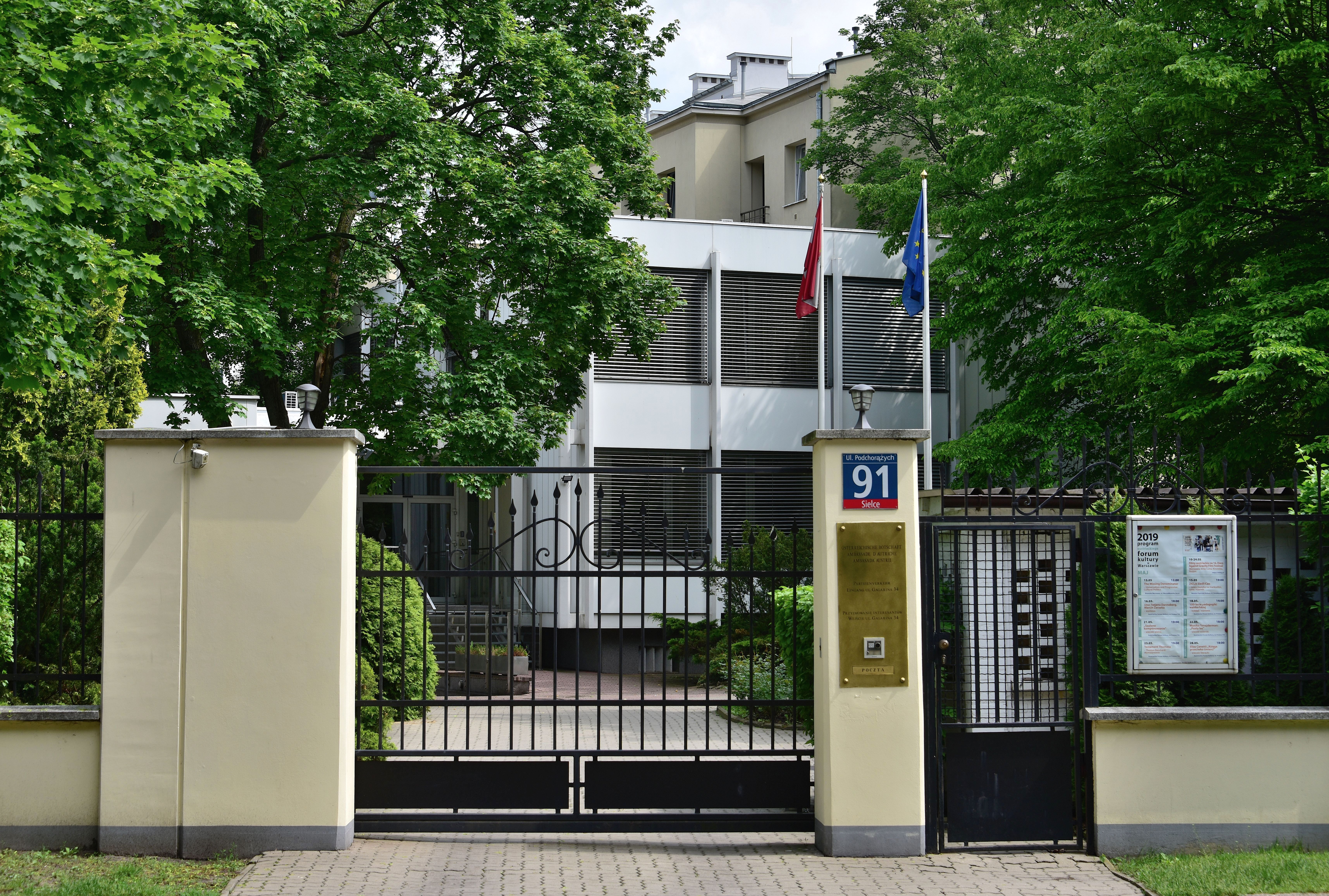 Ambasada Austrii przy ul. Gagarina 34, widok od strony ul.Podchorążych w Warszawie